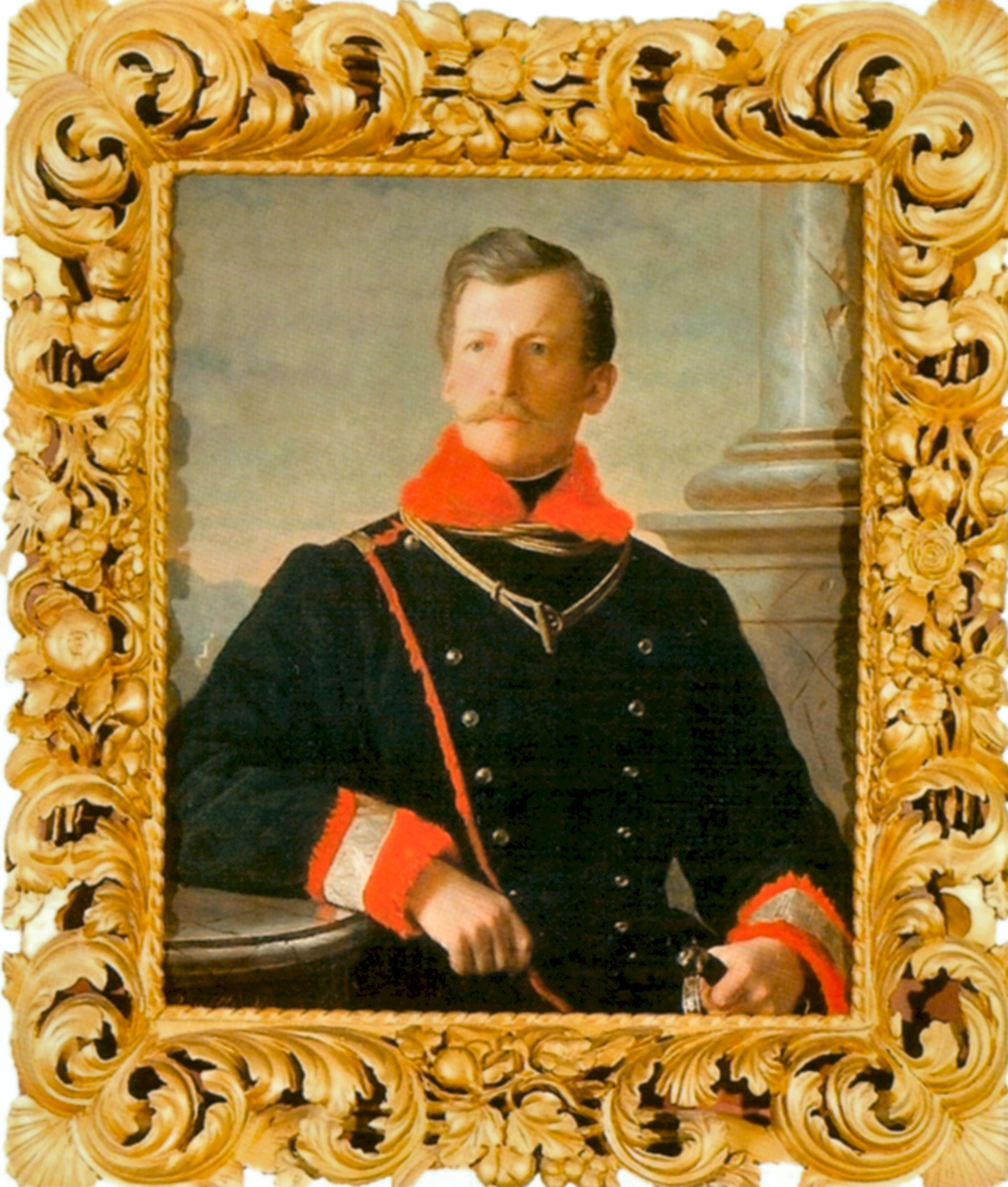 Karl Graf Bigot de St. Quentin als Dragoneroberst 1851, 1869 General der Kavallerie